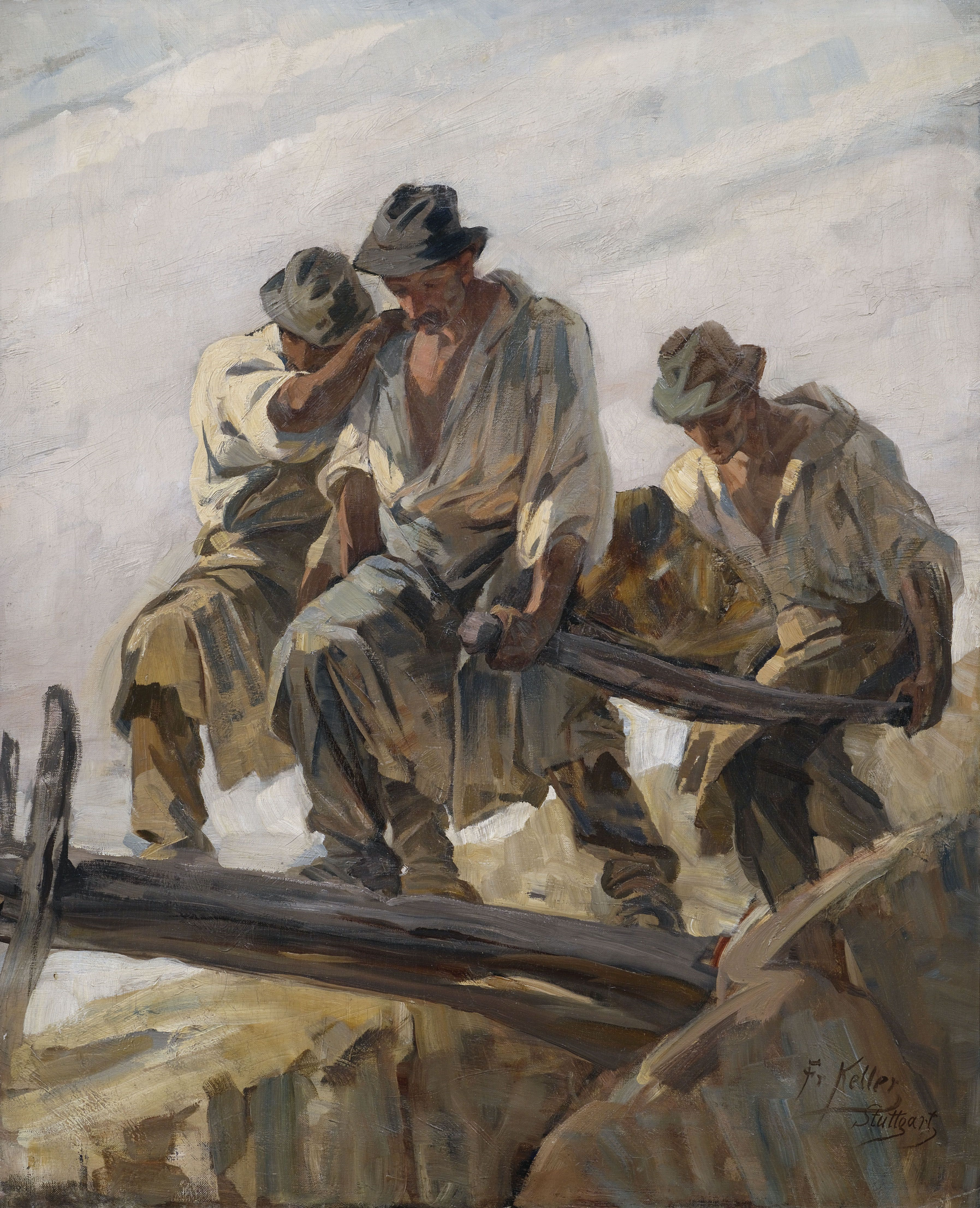 Steinbrucharbeiter beim Überqueren eines schmalen Stegs. Öl auf Leinwand, unten rechts signiert und bezeichnet "Stuttgart". 105 x 85 cm. Provenienz: Sammlung Gert Nagel.